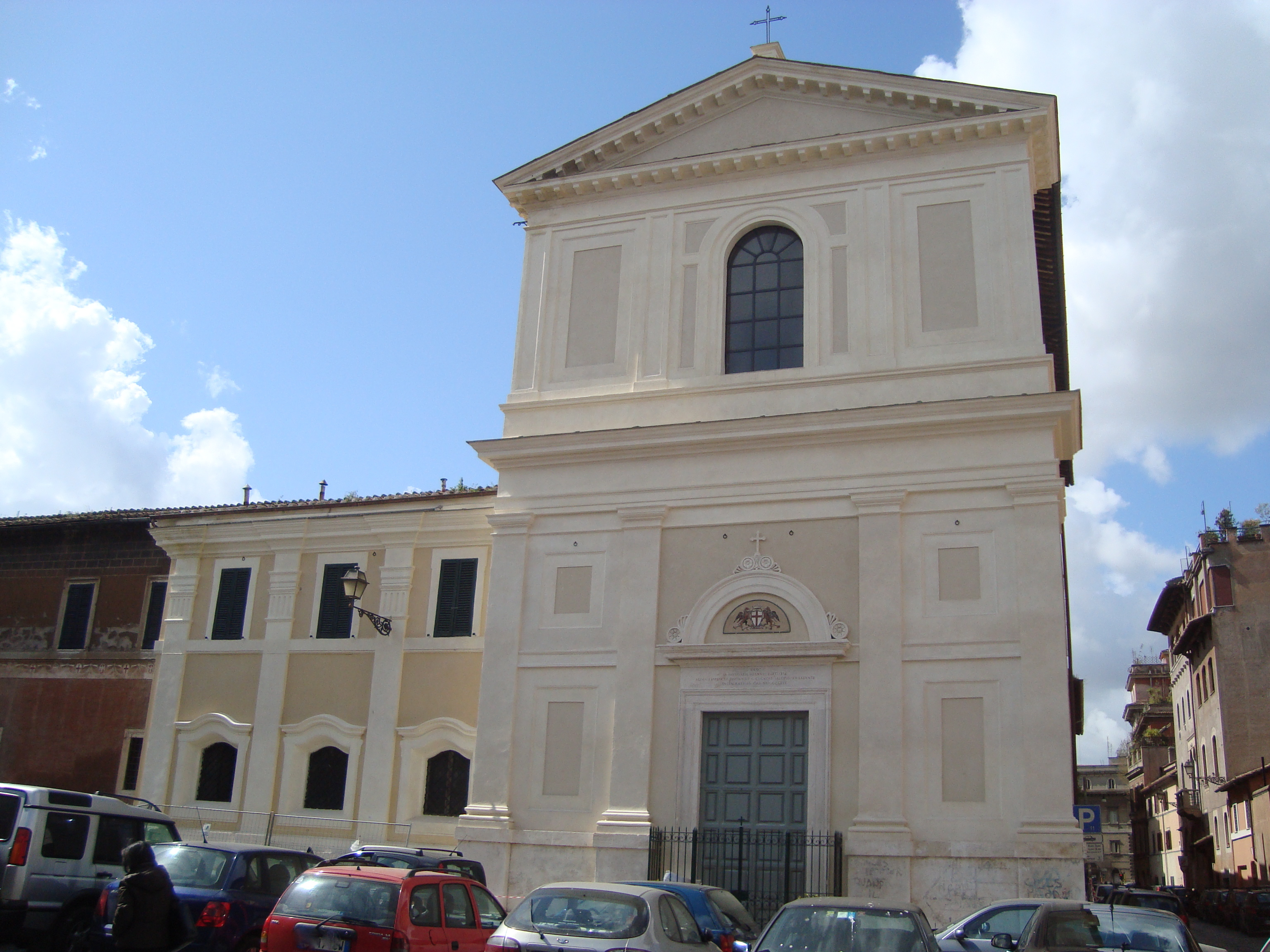 Eglise San Giovanni Battista dei Genovesi à Trastevere, Rome